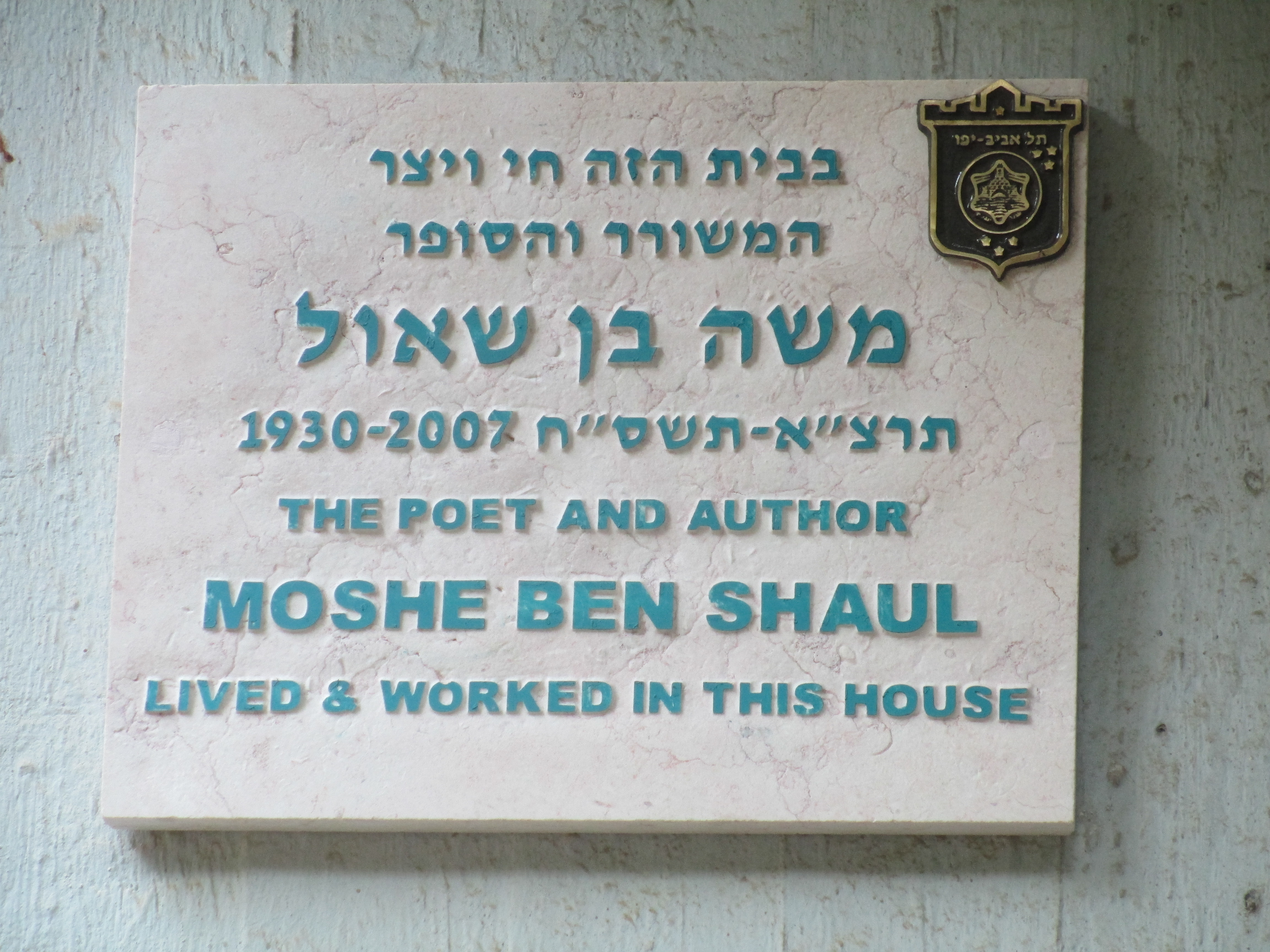 לוחית זיכרון למשה בן שאול ברח' סוקולוב 17 בתל אביב